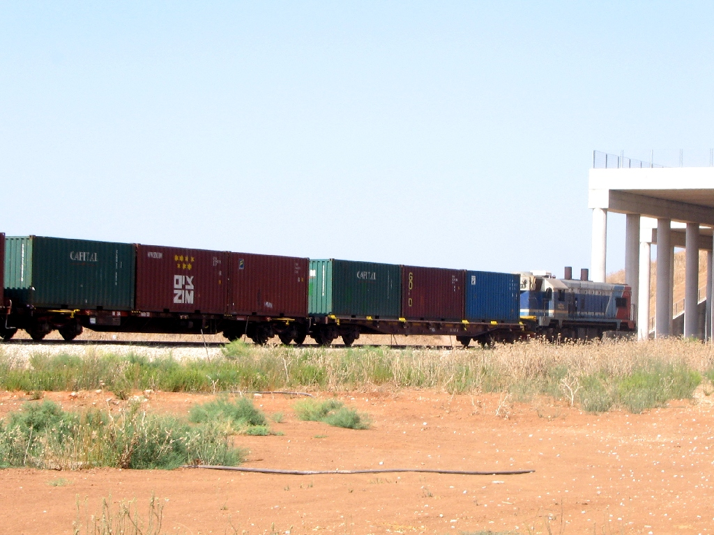 קרונות משא שטוחים עם מכולות של רכבת ישראל